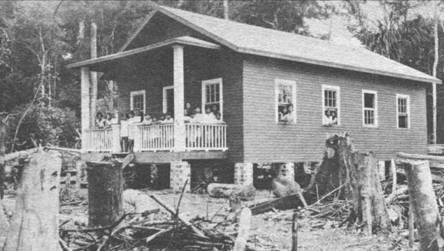 Primera escuela colombiana pública en Leticia en 1932